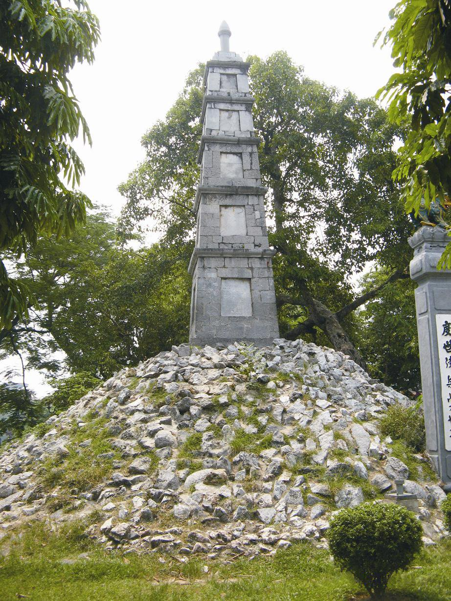 Thap But-Pen Tower at Hoan Kiem lake, Hanoi